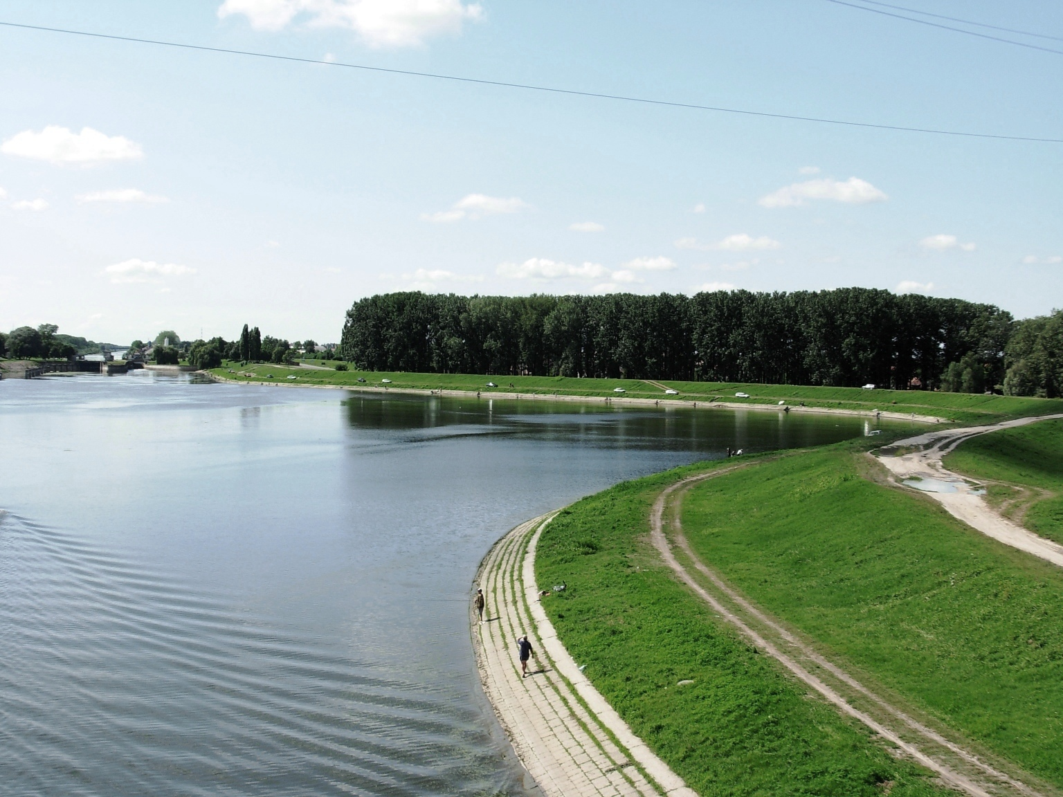 Kanal DTD u Novom Sadu. Pogled sa Klisanskog mosta.